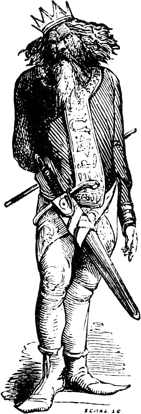 Une illustration pour l’article Baalzephon dans le Dictionnaire infernal par Collin de Plancy.